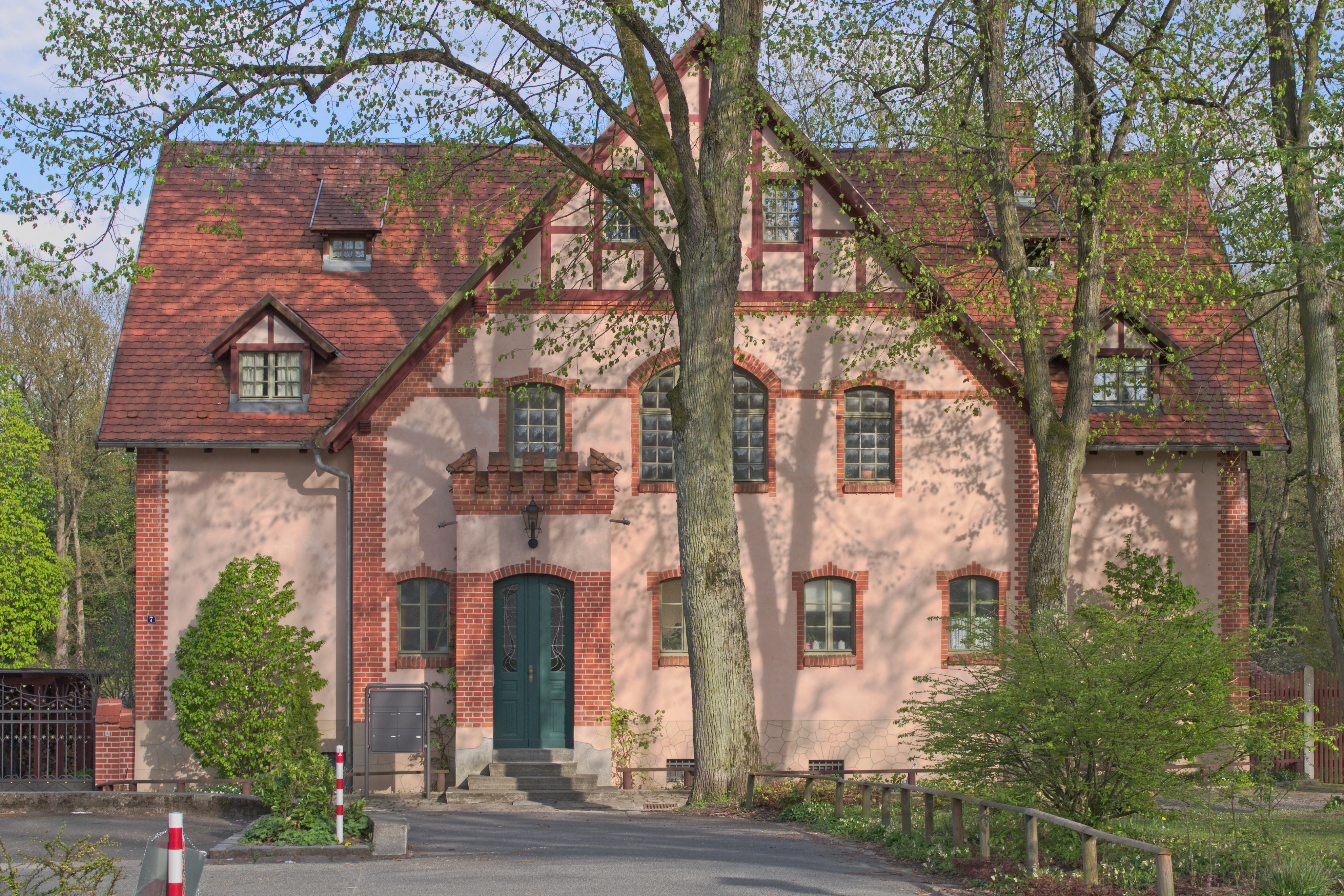 Pottensteiner Straße 7 am Röhrensee in Bayreuth, errichtet 1904